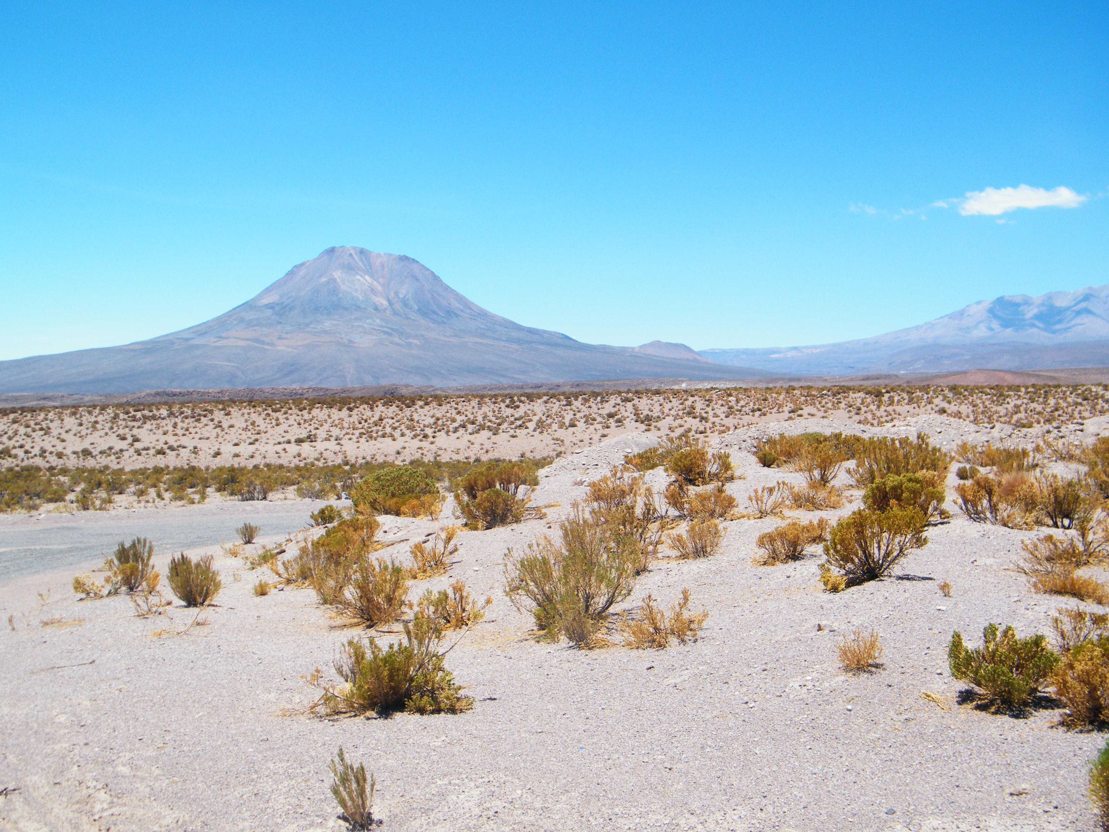 cariquima